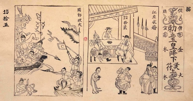 中文（香港）: 阮朝版畫本